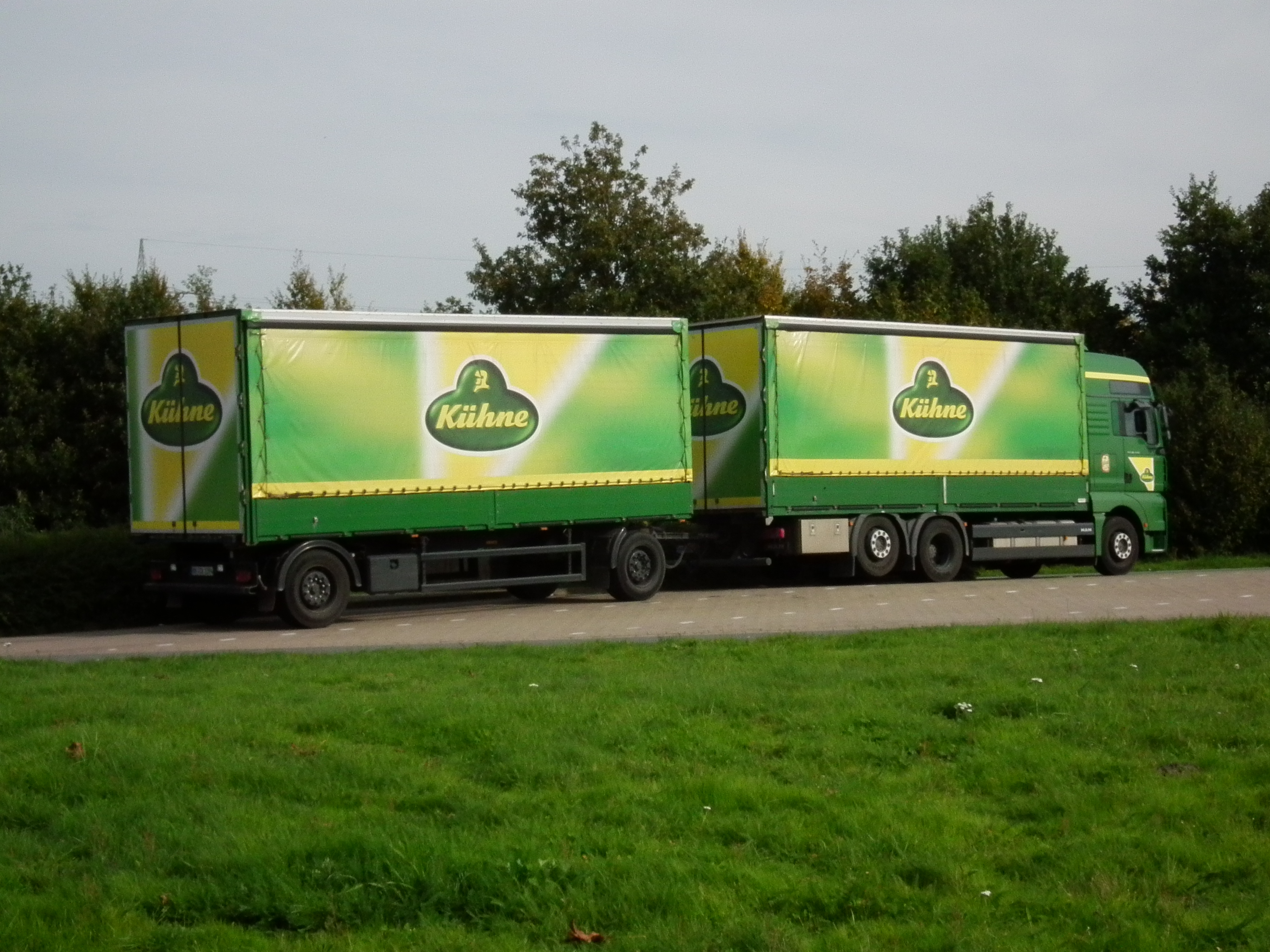 LKW mit Anhänger der Firma Carl Kühne KG in Deutschland